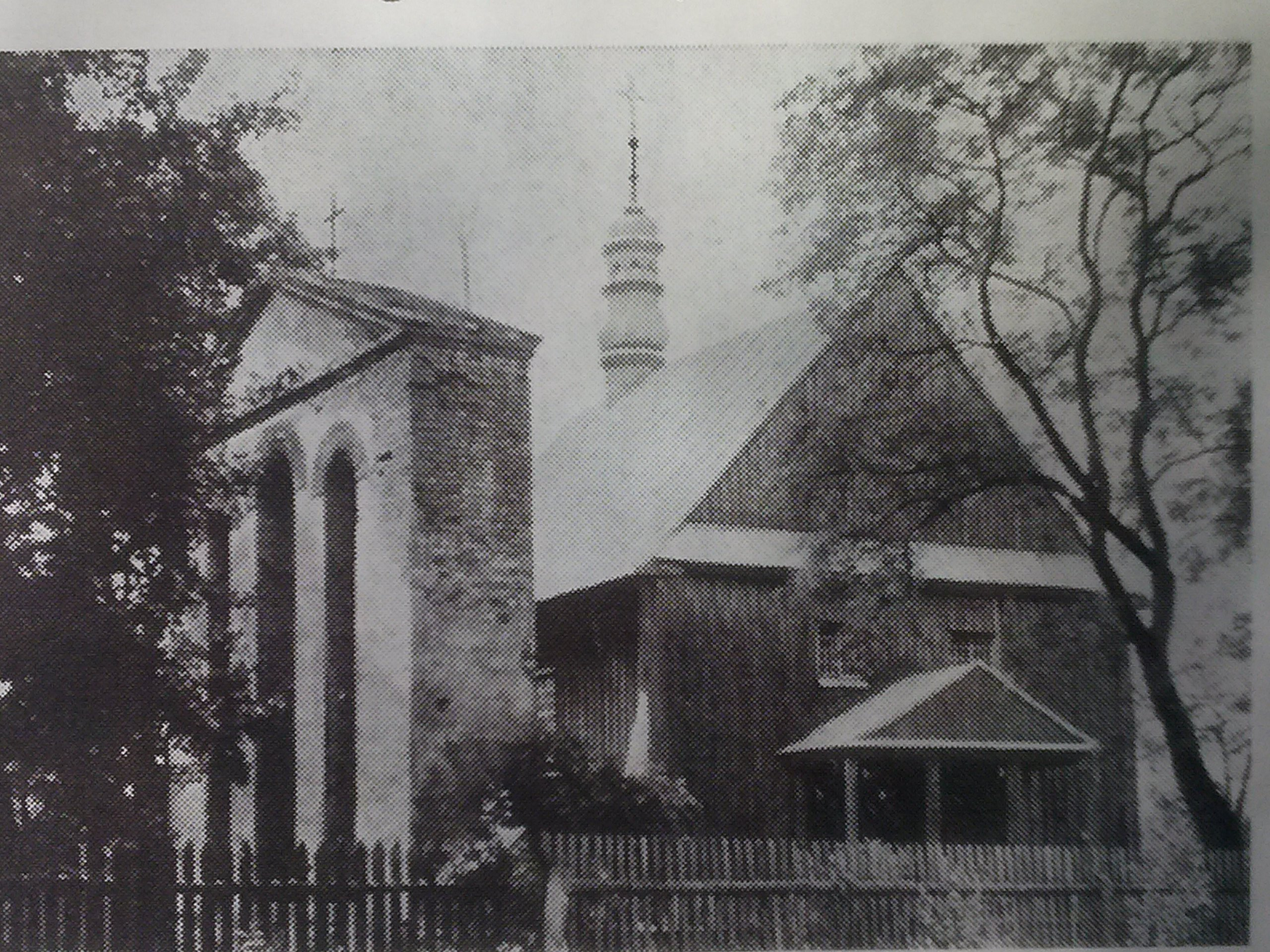 Niezachowany kościół pw. św. Franciszka Salezego i Andrzeja Boboli w Gorzycach (1828–1944)